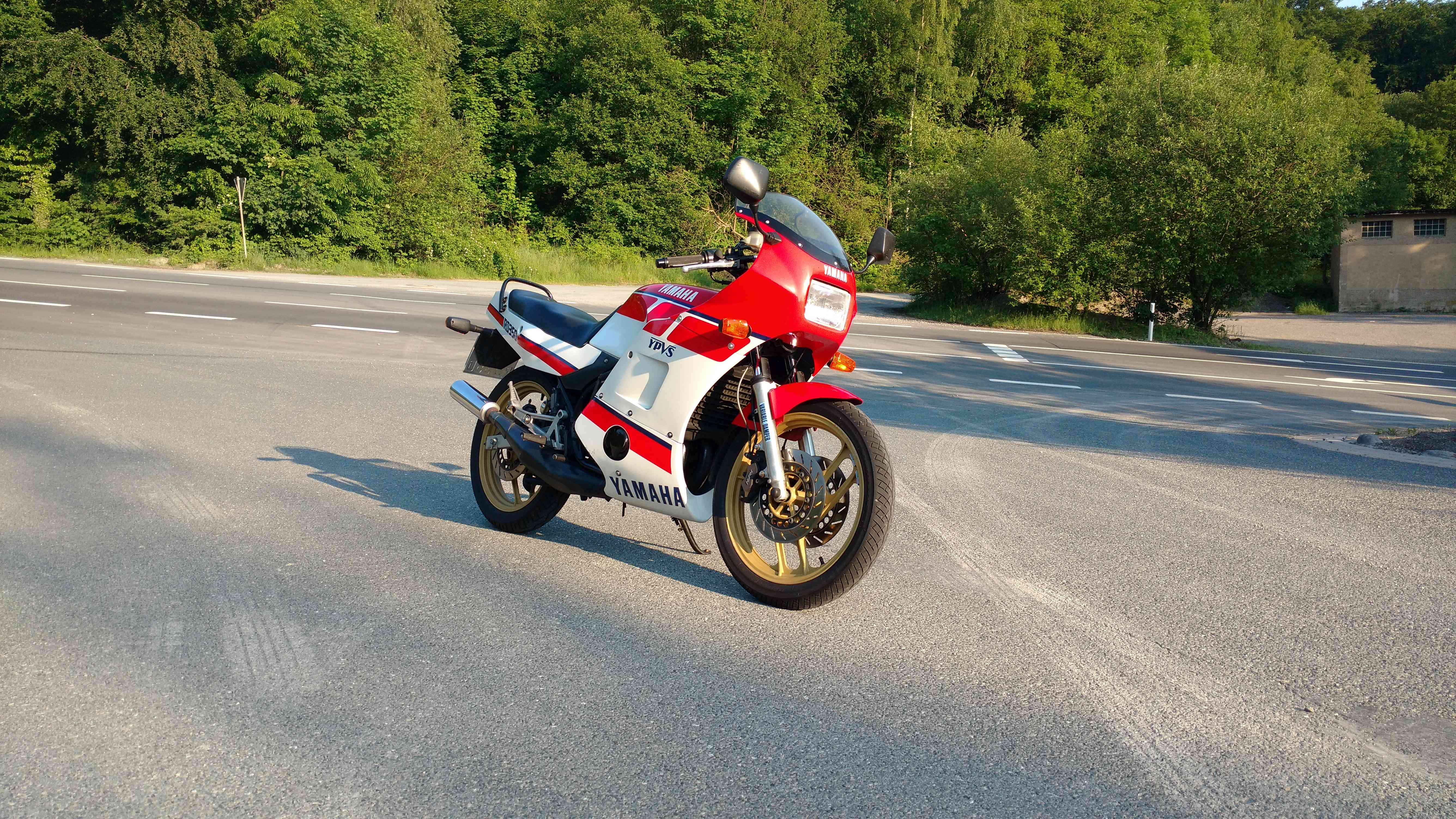 Yamaha RD350LC YPVS (1WW)